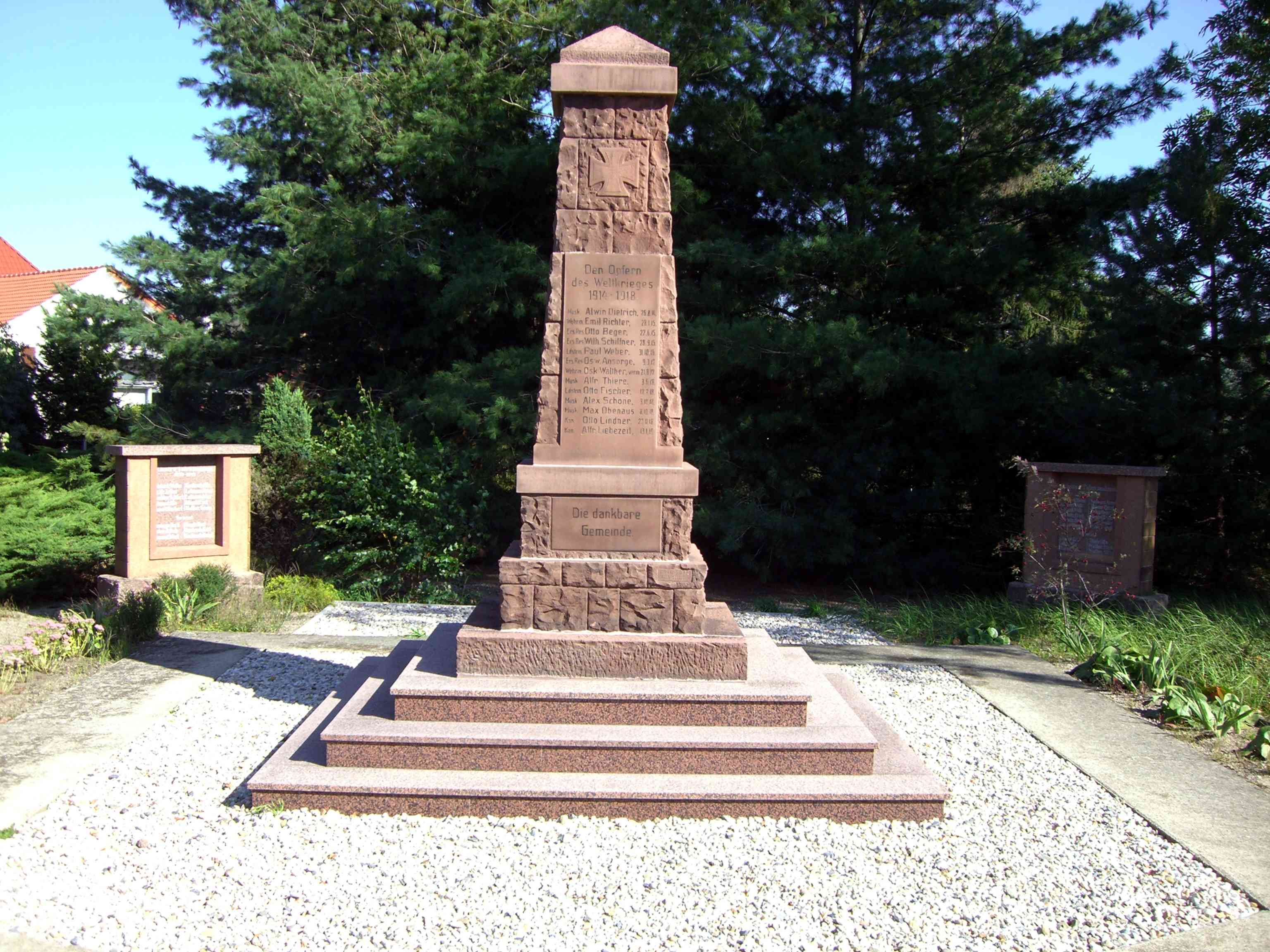 Kriegerdenkmal in Reichenhain, Deutschland.